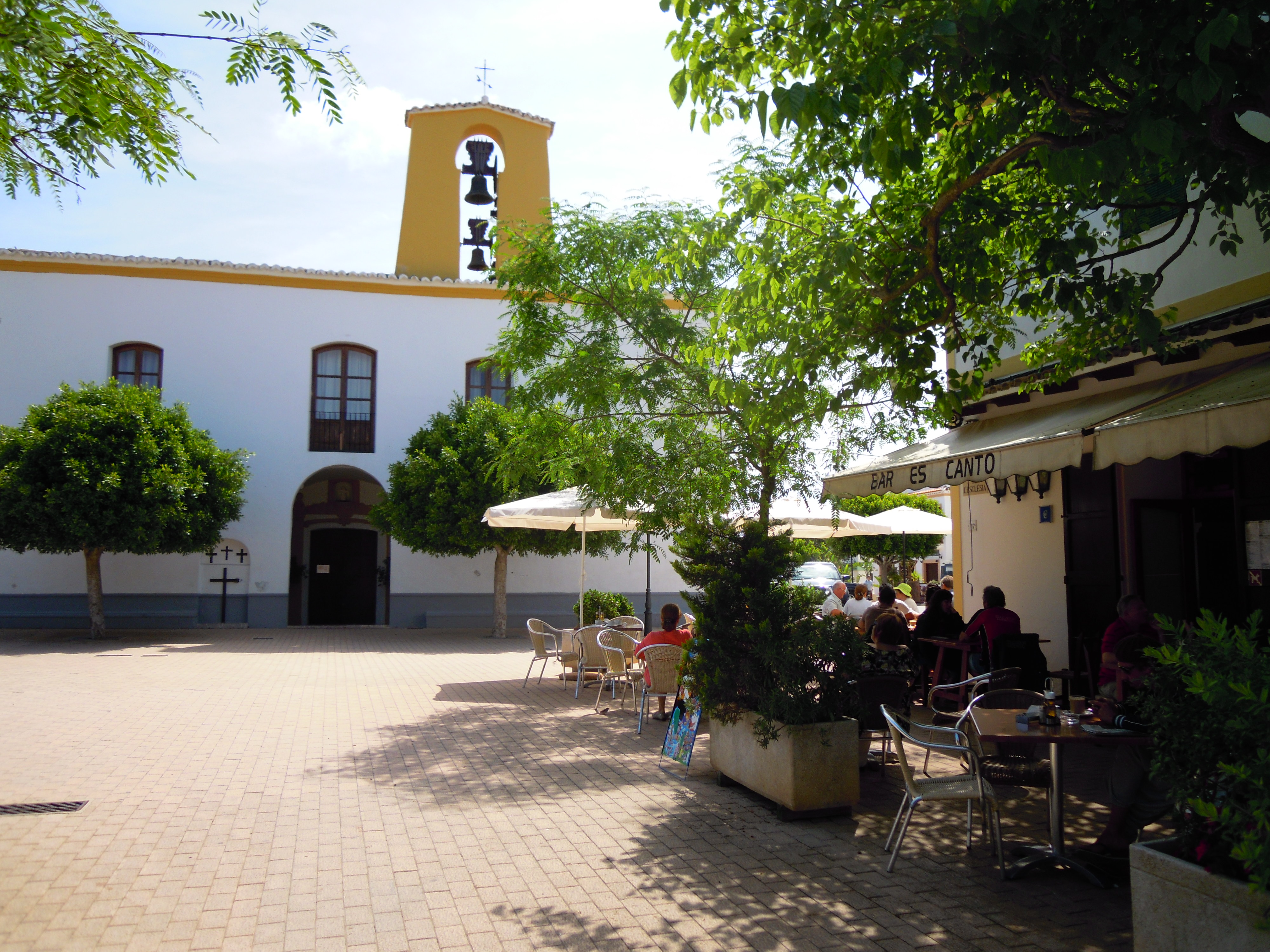 Santa Gertrudis de Fruitera, Ibiza, Spain